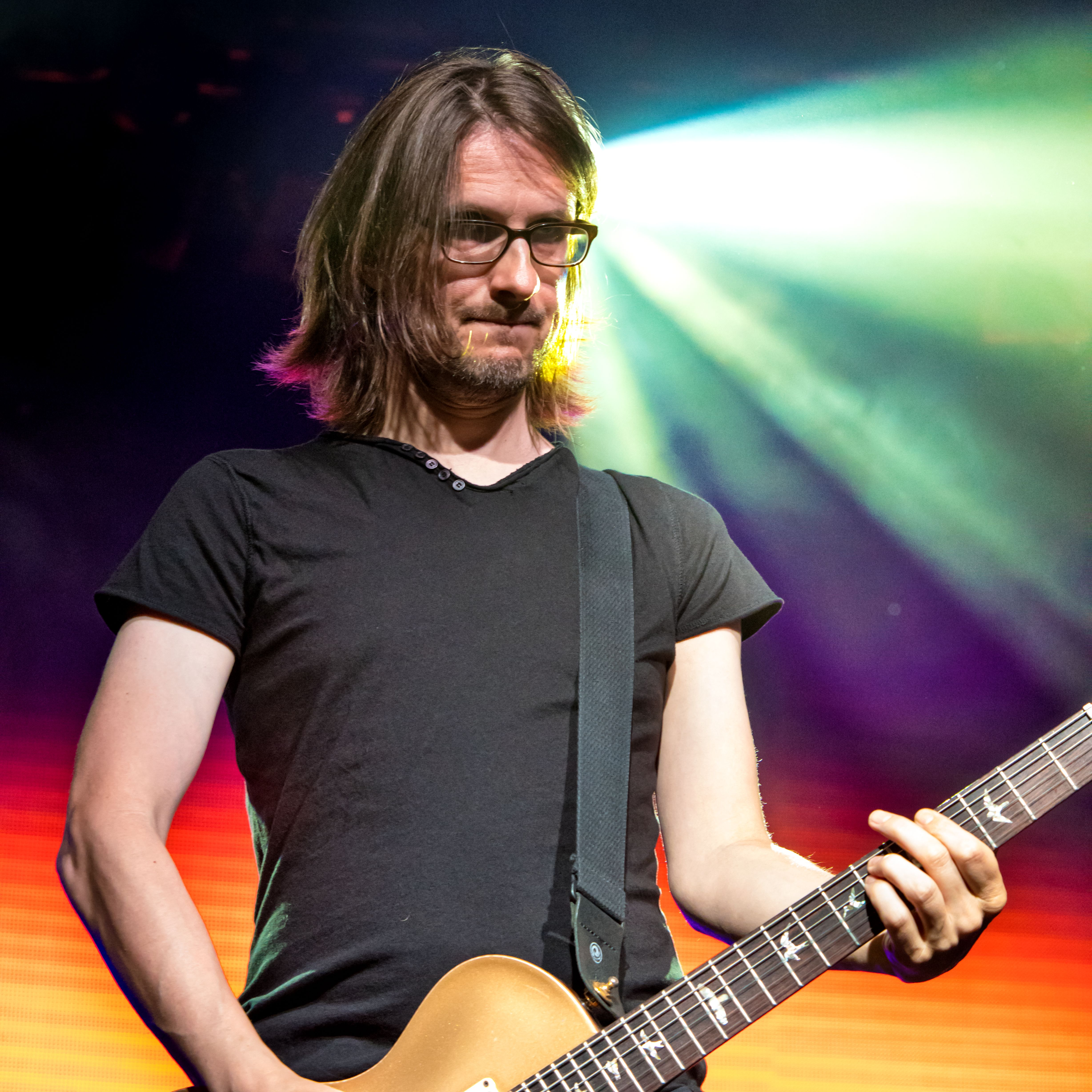 Bilder vom Zelt Musik Festival 2016 in Freiburg im Breisgau Steven Wilson